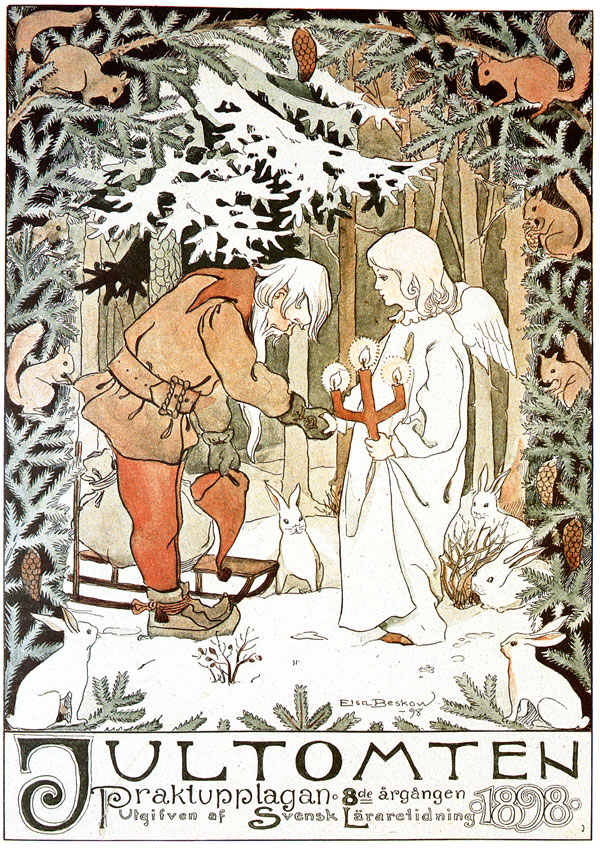 Журнал Jultomten 1898 года